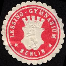 Sealing stamp Title: Lessing - Gymnasium - Berlin Description: rot, weiß, geprägt Place: Berlin size: 4 cm